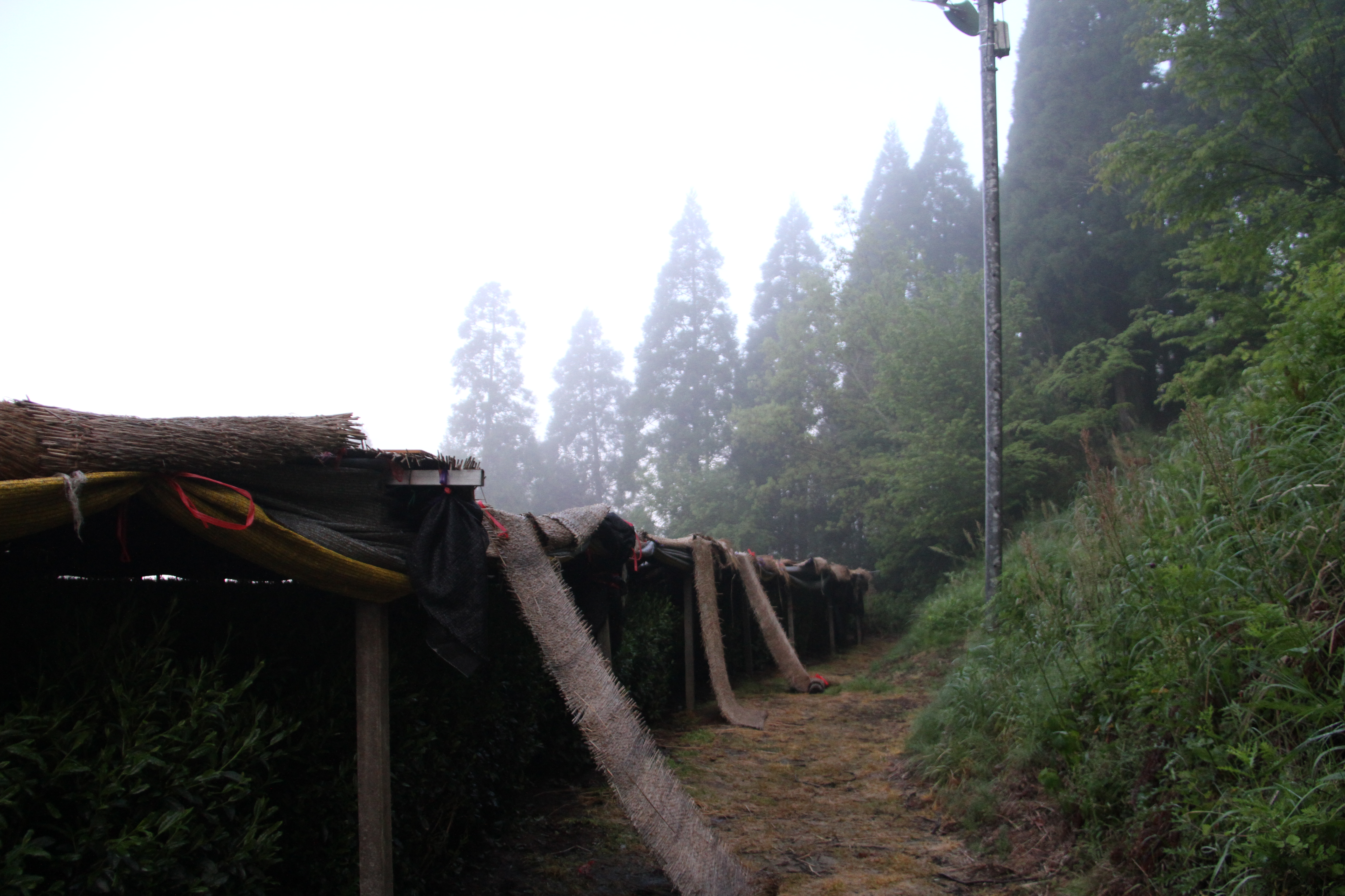 八女伝統本玉露茶摘み時の畑の様子（矢部村）